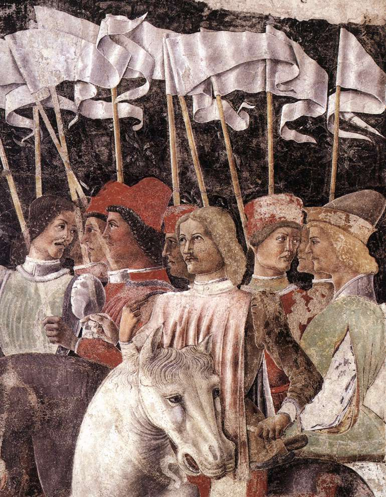 Horseman (detail)